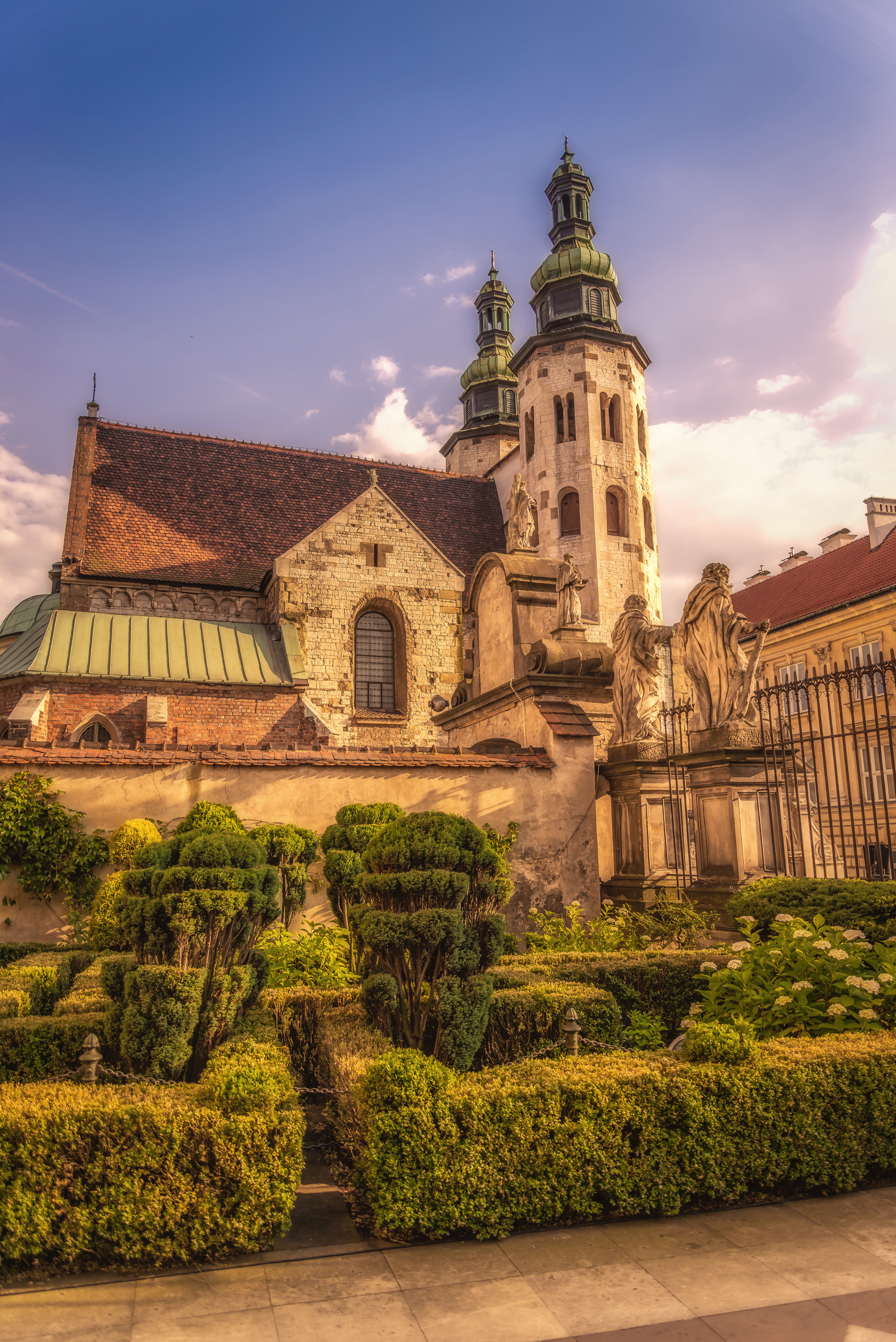 Kraków, kościół pw. św. Andrzeja, XI/XII, XVI, XVIII